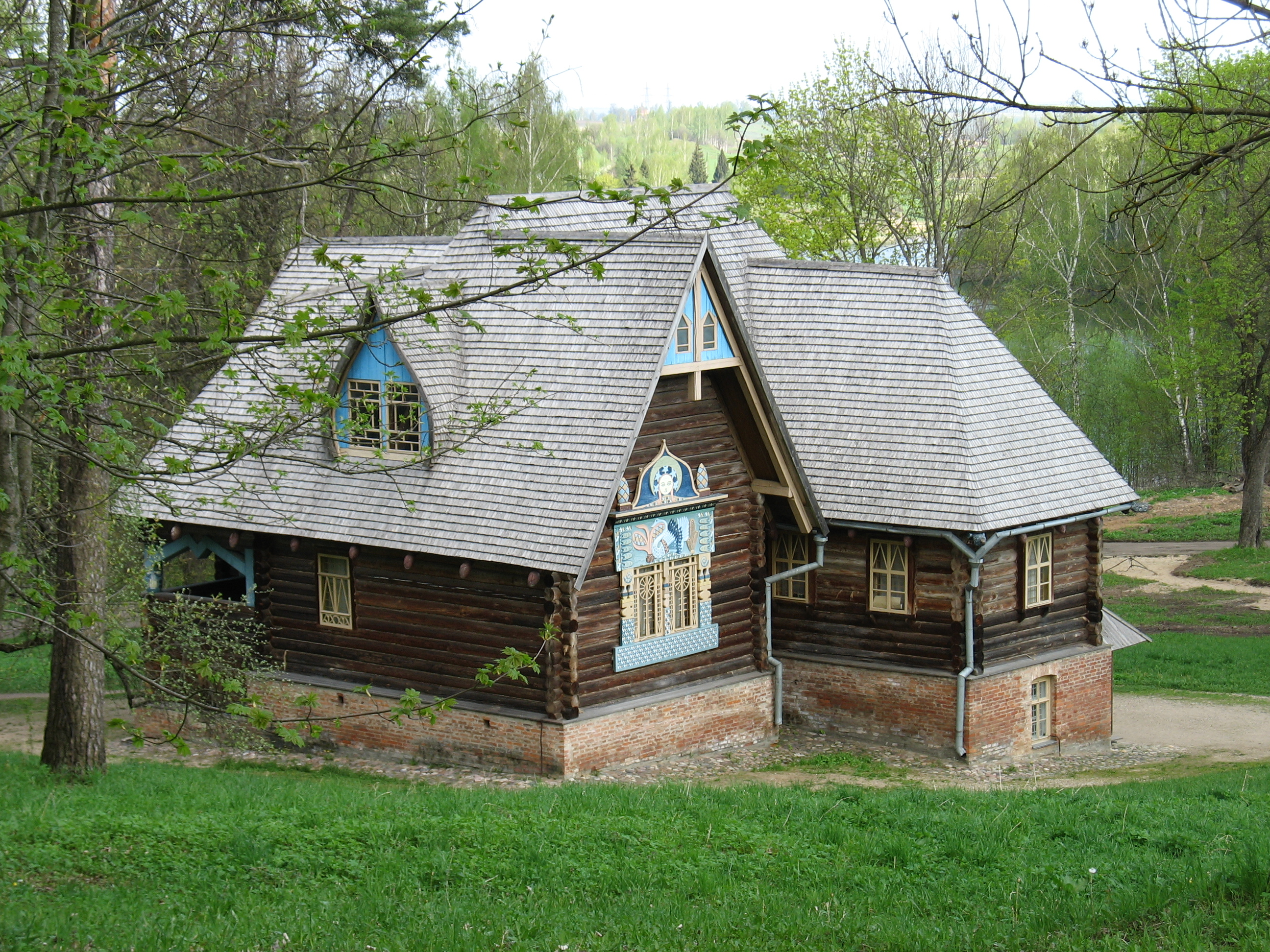 "Теремок" на территории бывшей усадьбы Тенишевых - Талашкино